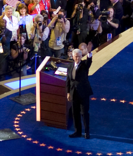 20080827_DNCC_Day3_453